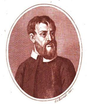 Ritratto di GianGiacomo Adria